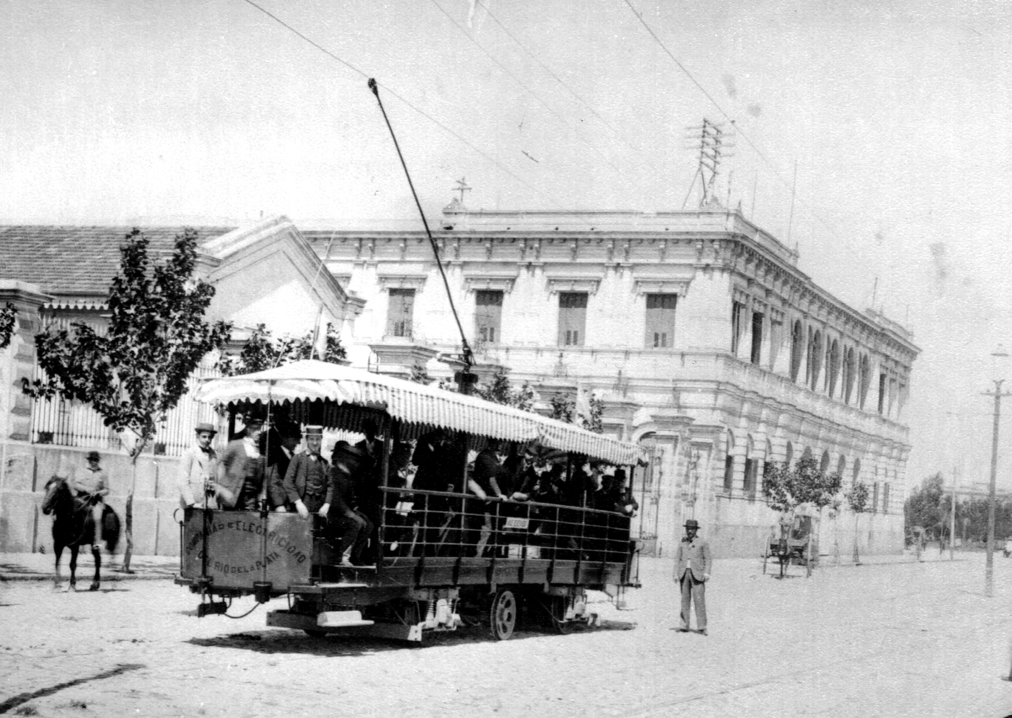 Corresponde al segundo día de ensayos del tranvía eléctrico en la ciudad de La Plata, en la calle 7 entre 45 y 50.